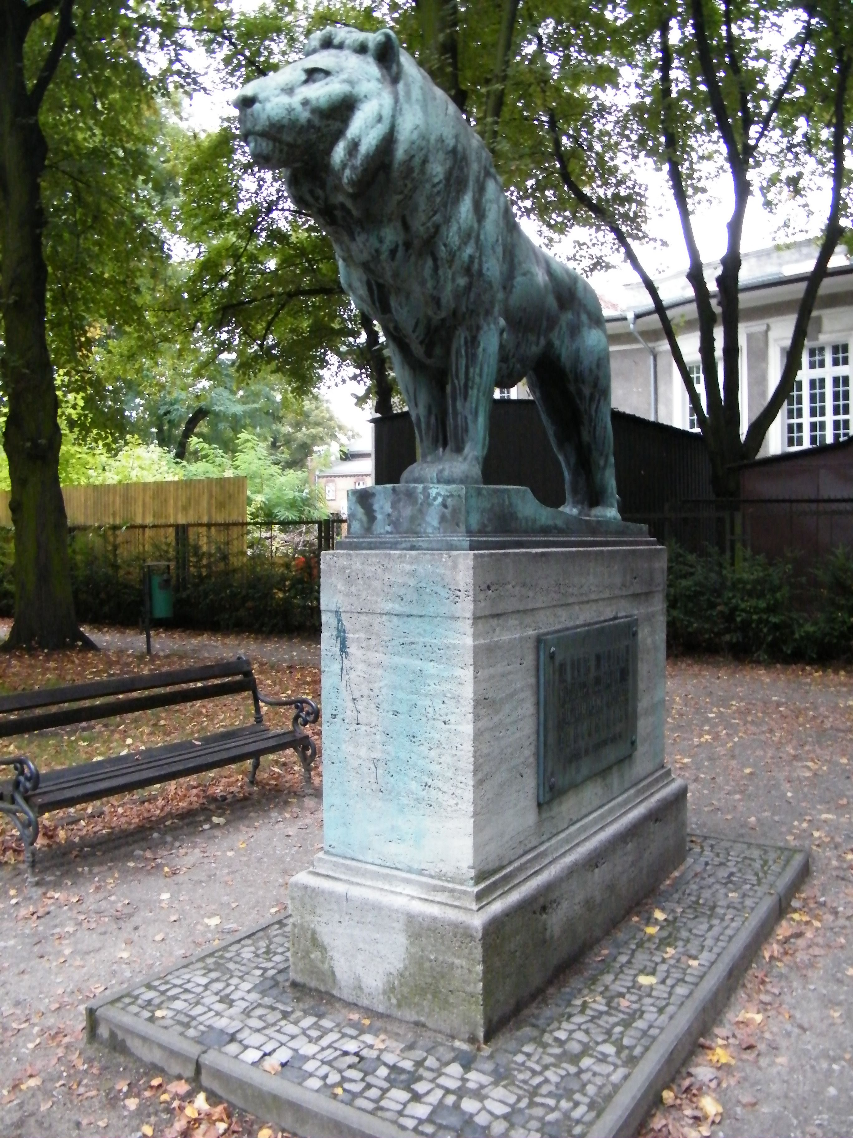 Poznań, ogród zoologiczny (stary), kon. XIX